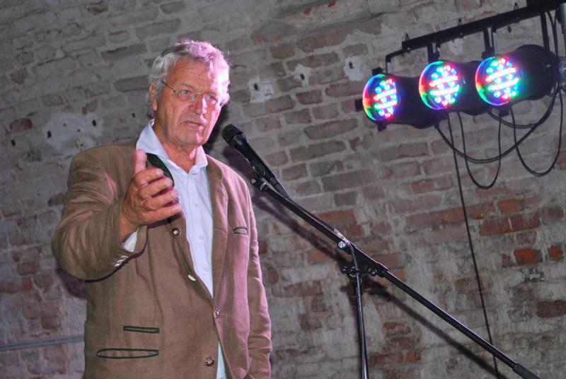 Gerhard Polt bei K.i.W. Wörth Donau